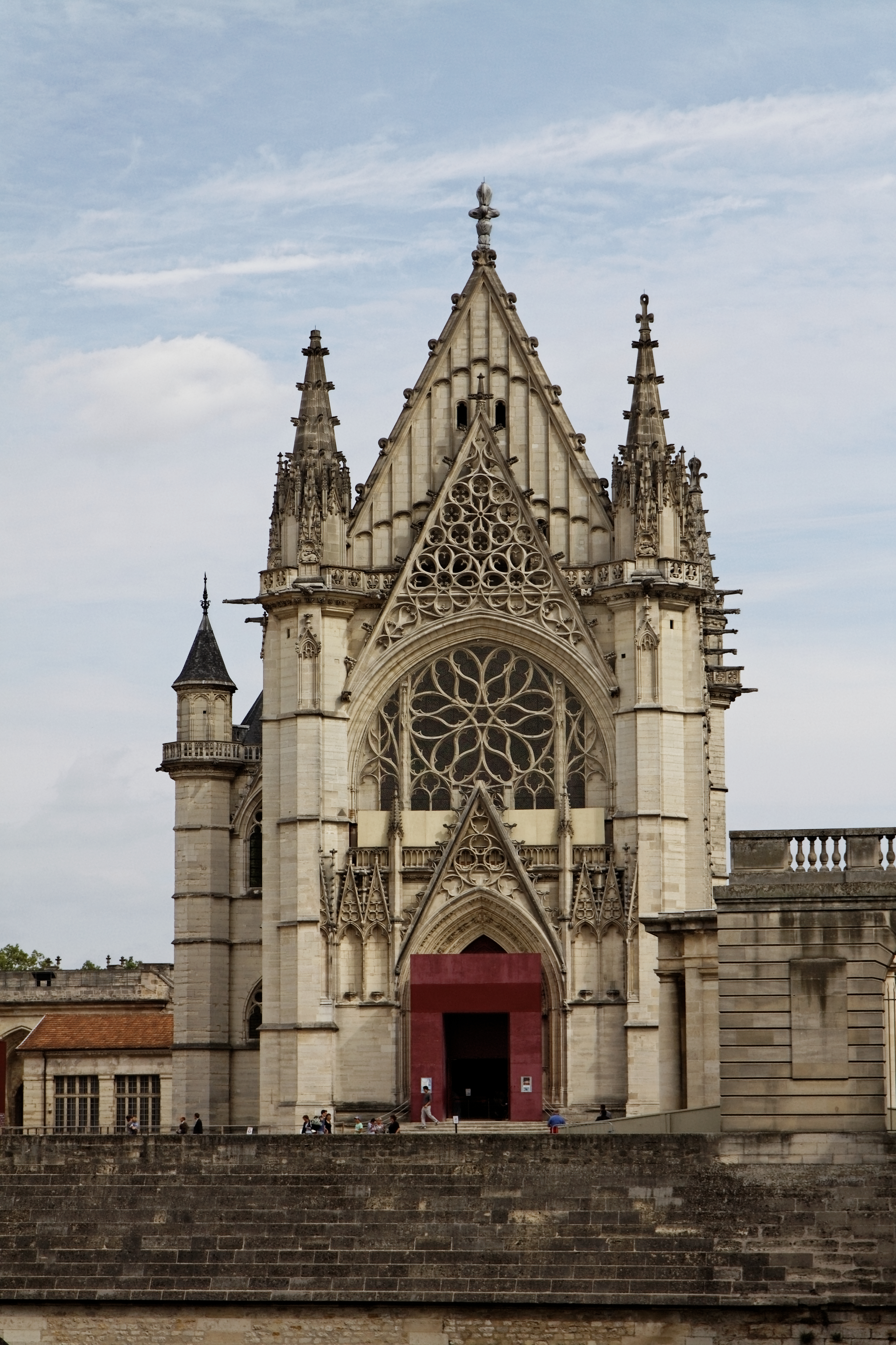 Le château de Vincennes.